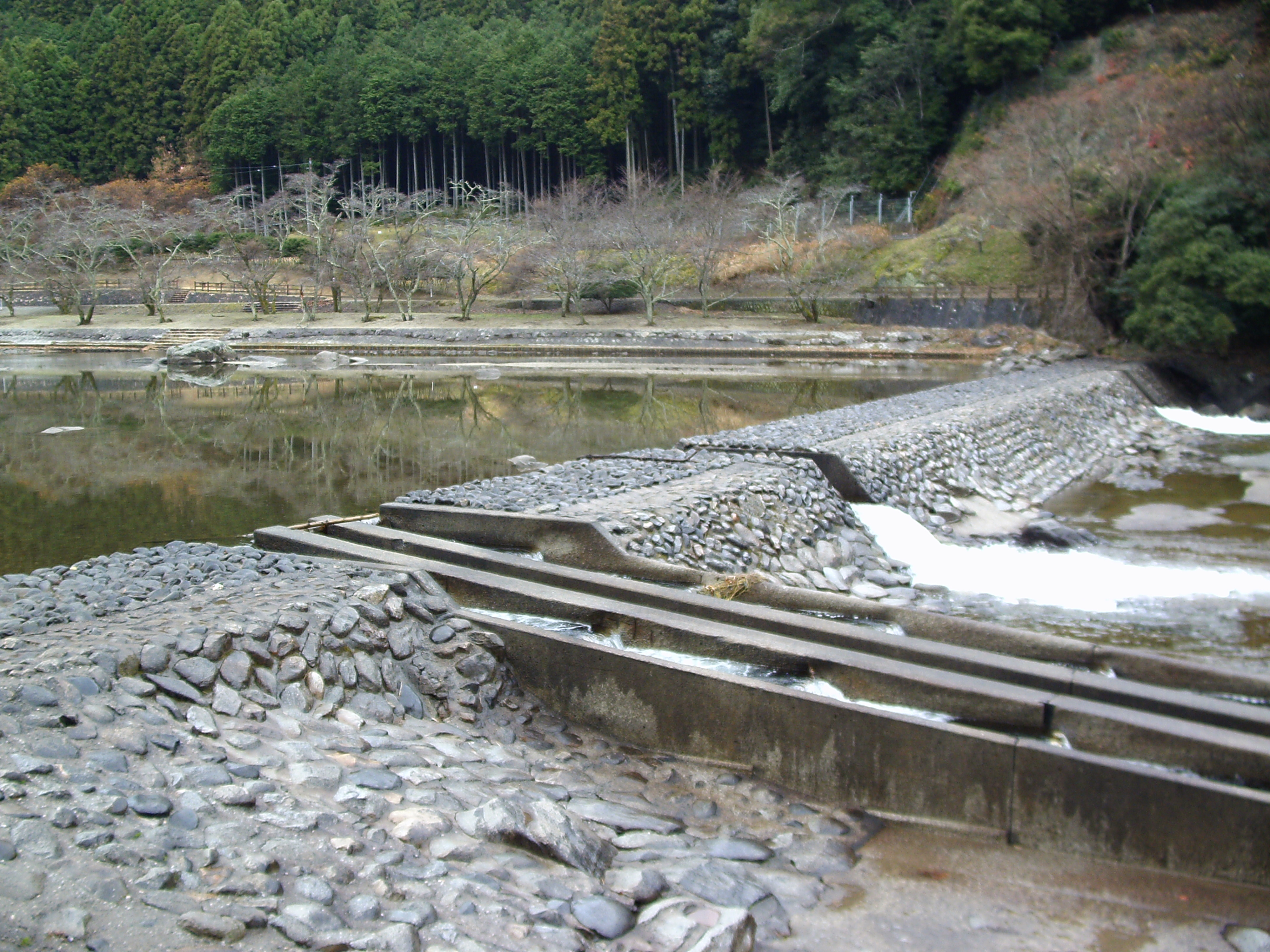 かんがい施設遺産「南家城川口井水」（三重県津市） 雲出川に設けられた取水用の石積み堰